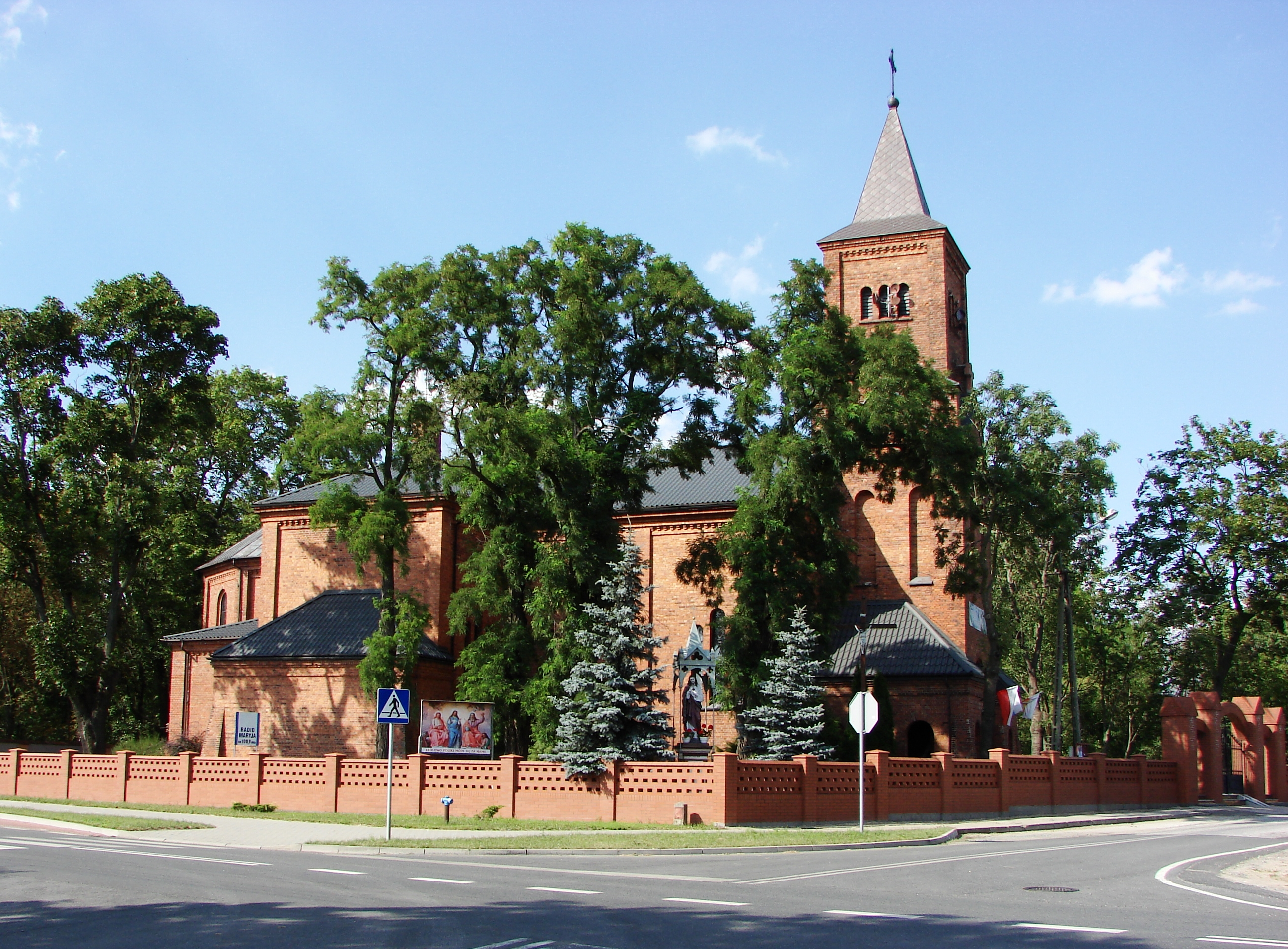 Siniarzewo, Gmina Zakrzewo, kościół p.w. Matki Boskiej Częstochowskiej, zbudowany w latach 1914 – 1920.